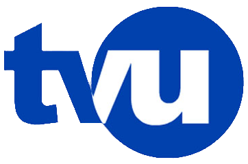 Logo TVU Concepción